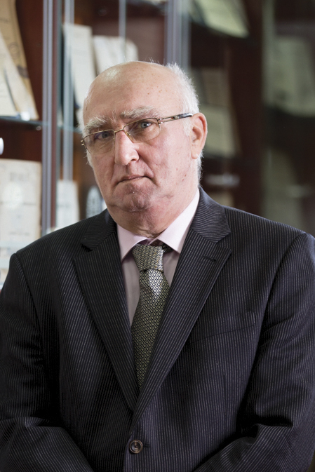 Српски (ћирилица): проф. др Ранко Кеча